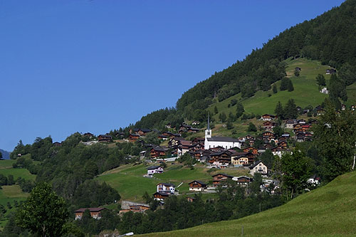 Ergisch